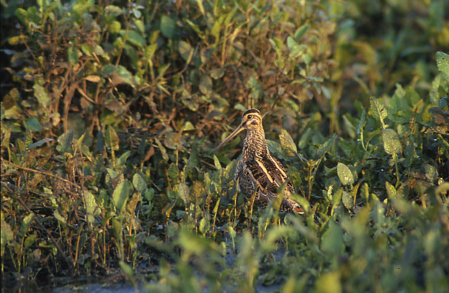 Gallinago gallinago